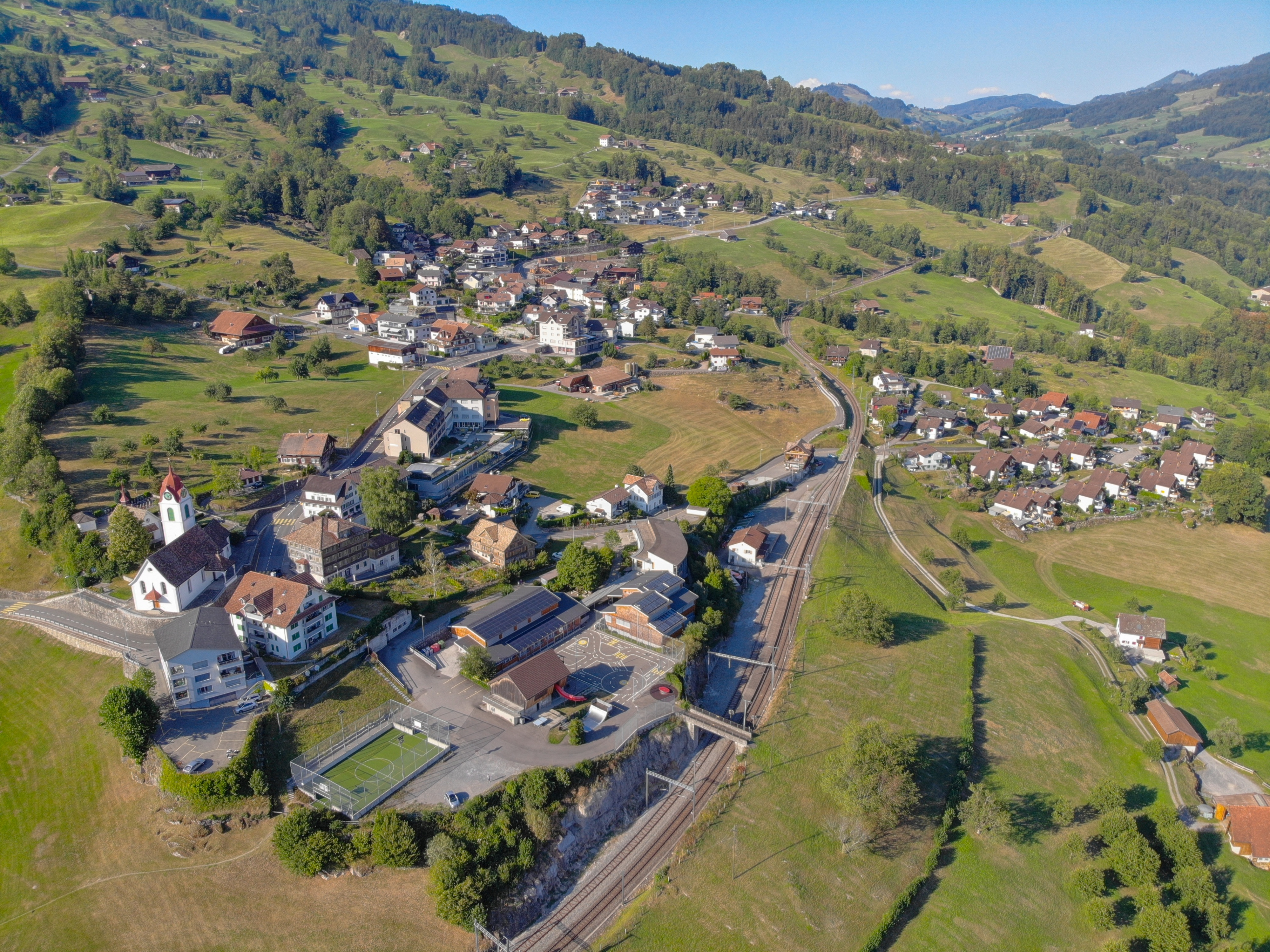 Luftaufnahme von Steinerberg, aufgenommen am 27. Juli 2018.